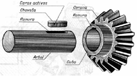 Clavetes i les seves parts.